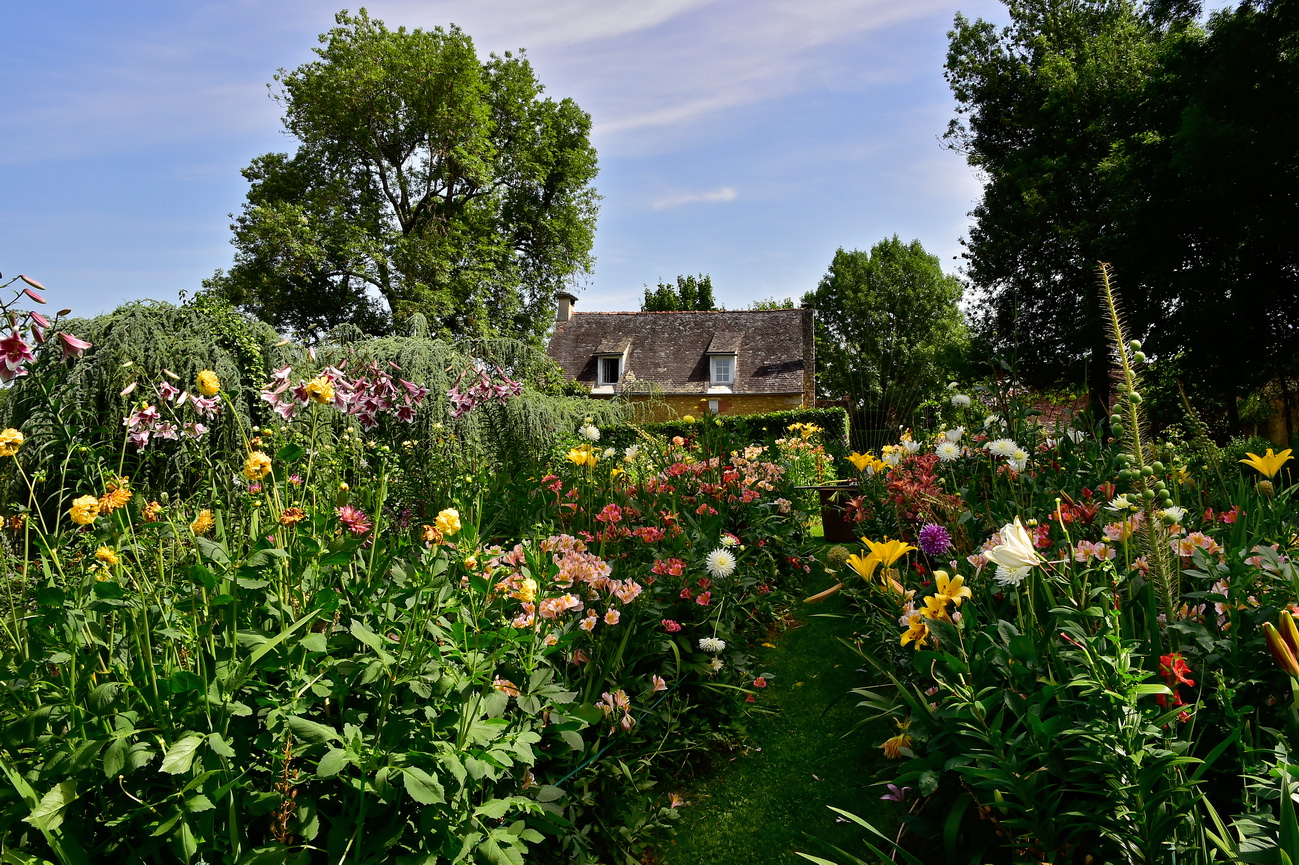 Jardins du Manoir d'Eyrignac, Bauern- Blumengarten